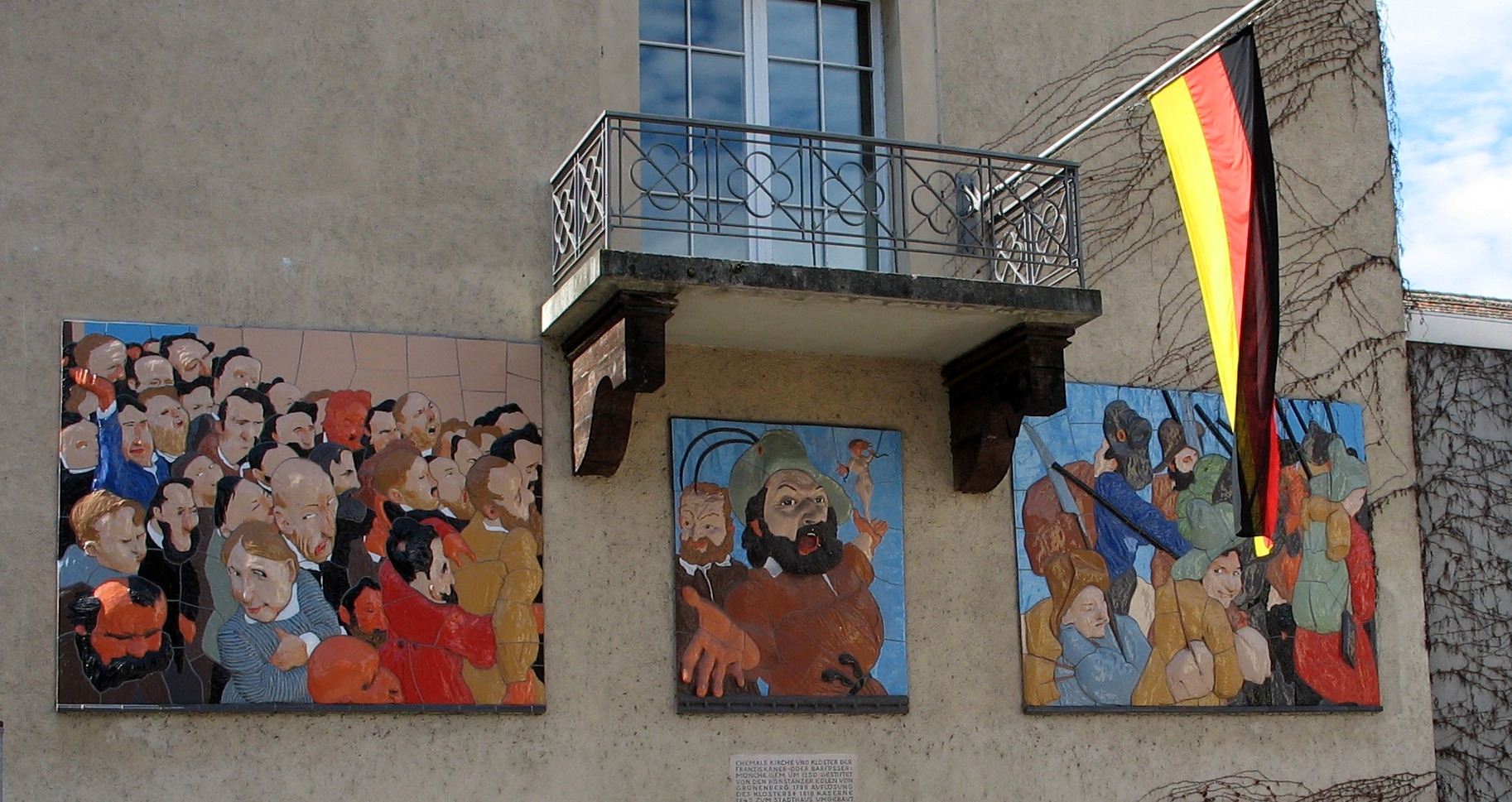 Ostfassade des Stadthauses von Konstanz (ehem. Franziskanerkirche), Balkon und Relief des Heckerzuges. Das Relief wurde von Johannes Grützke 1996/98 gestaltet. In der Mitte Friedrich Hecker als Volkstribun, links die ablehnenden Städter, rechts der Heckerzug.